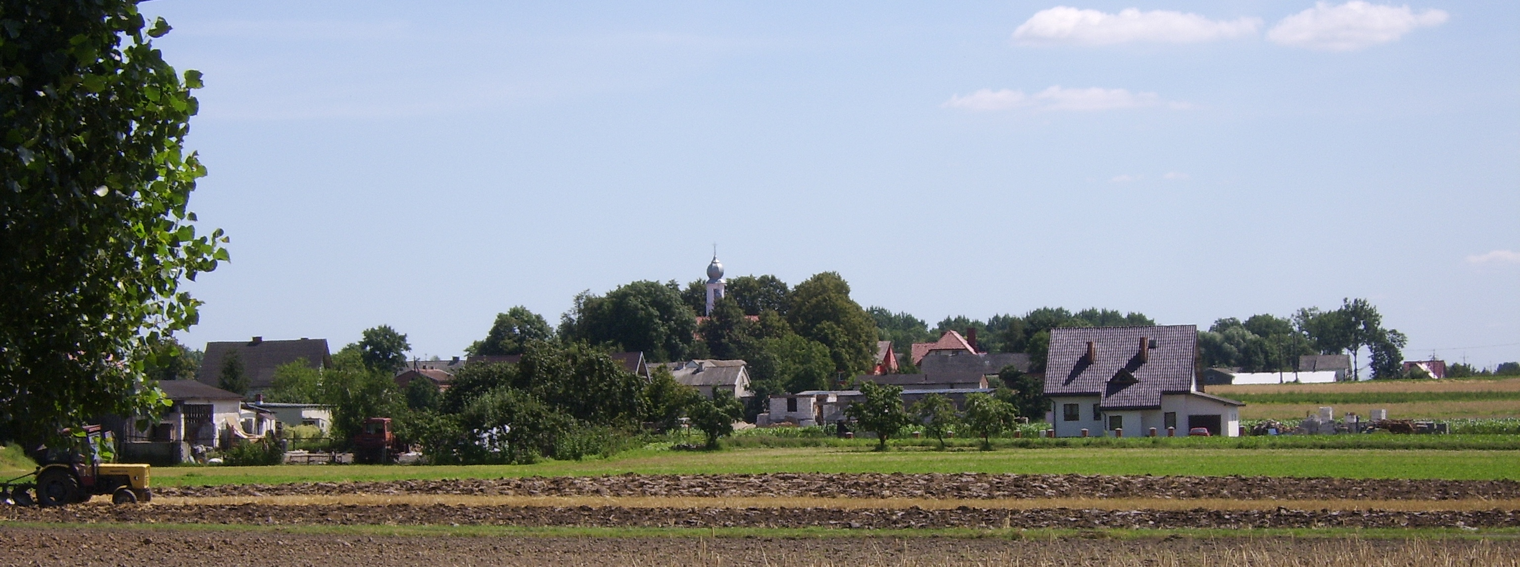 Łążyn, woj. kujawsko-pomorskie, gmina Obrowo: - panorama